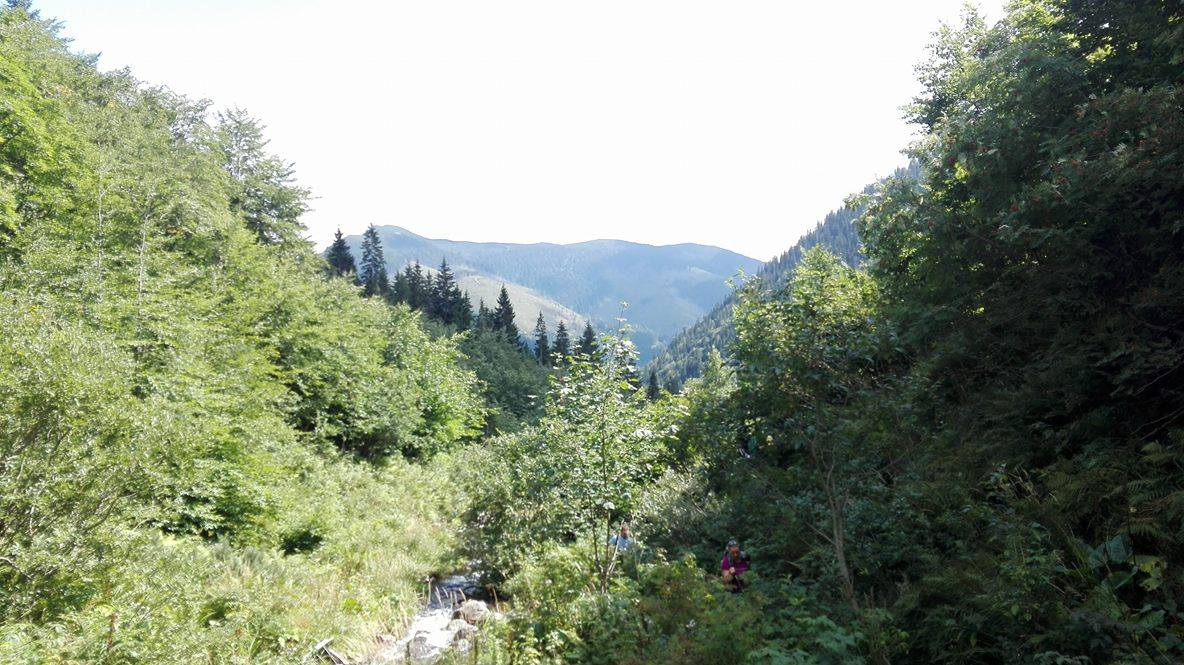 Vajskovská dolina